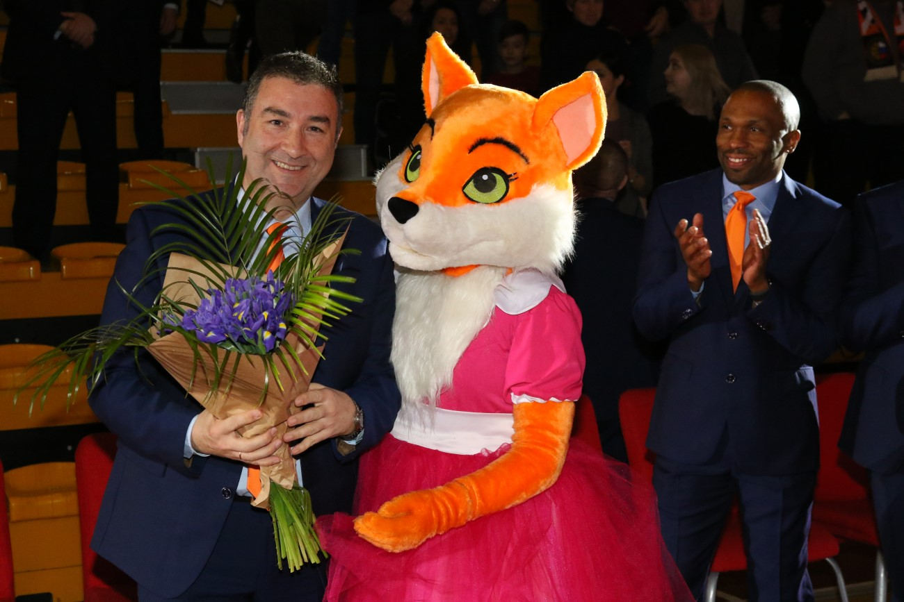 УГМК Екатеринбург – ТТТ Рига (Латвия) 78:45